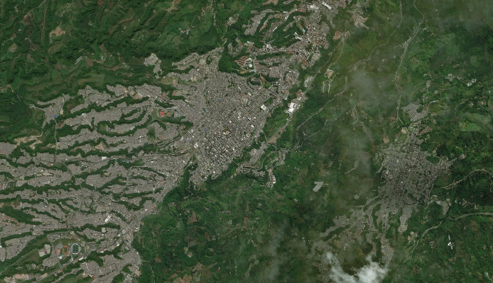 Imagen satelital de Armenia y Calarcá